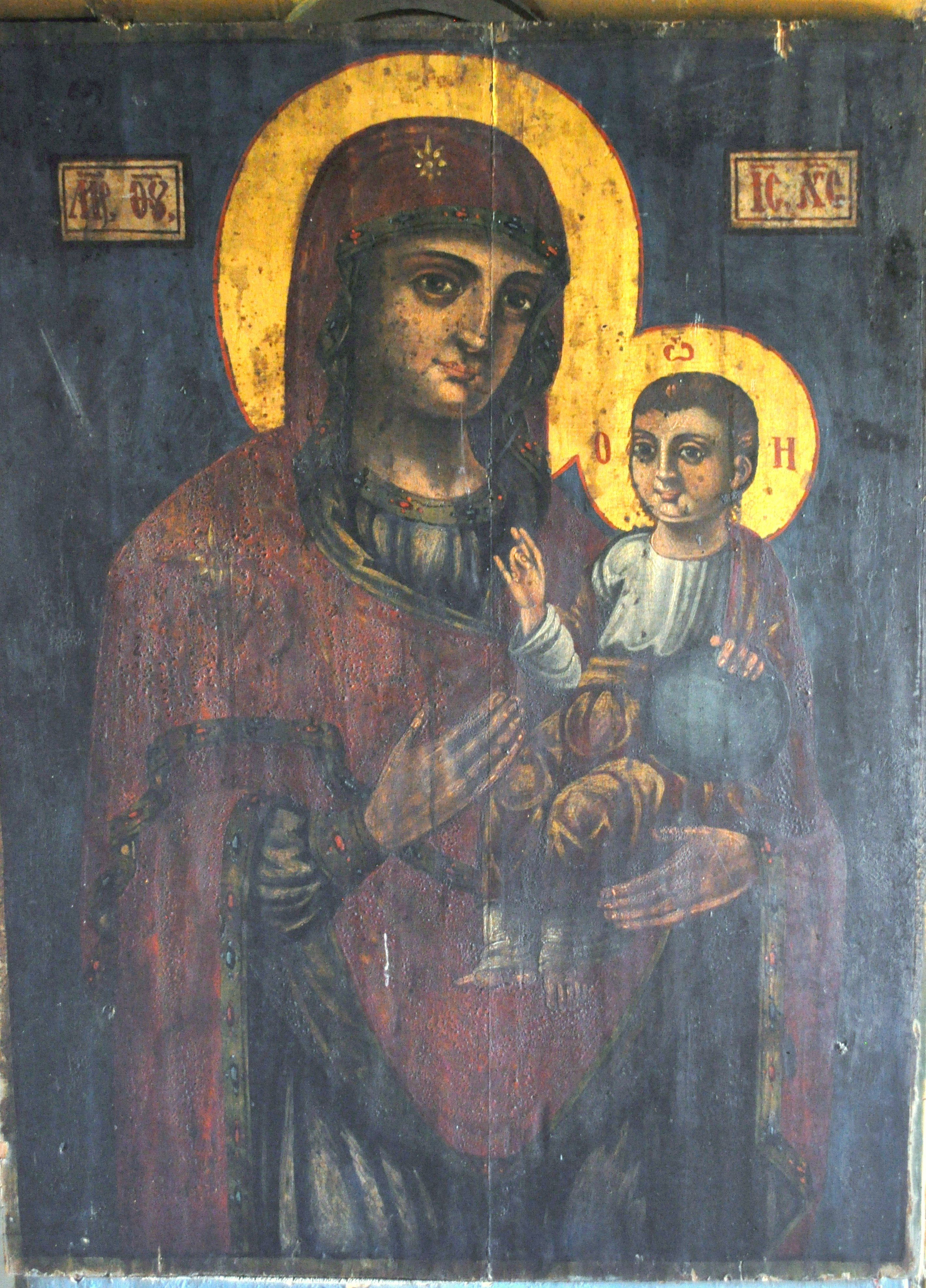 Biserica de lemn „Cuvioasa Paraschiva” din satul Valea Sării, județul Vrancea